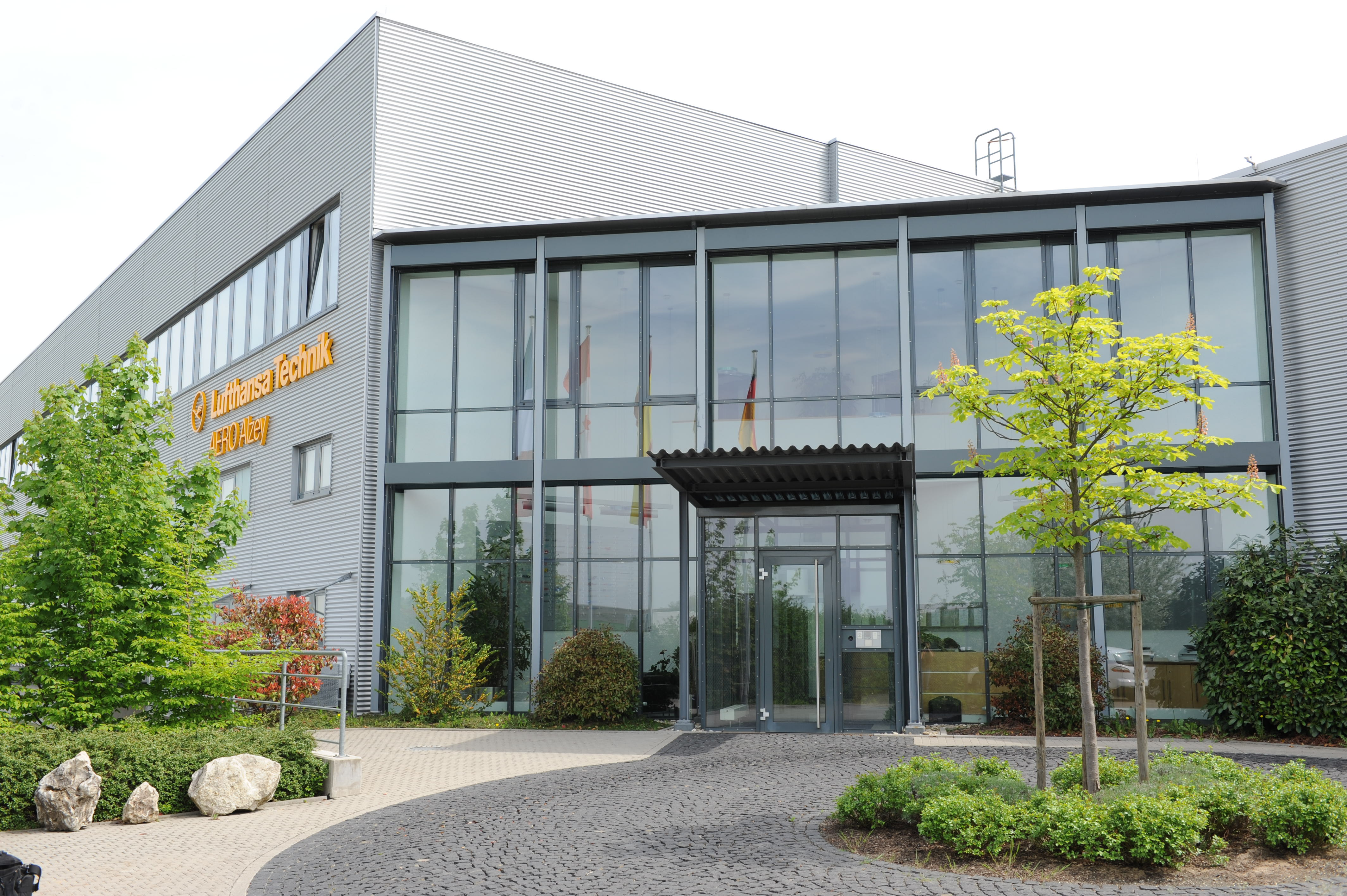 Haupteingang der Lufthansa Technik AERO Alzey GmbH (groß)